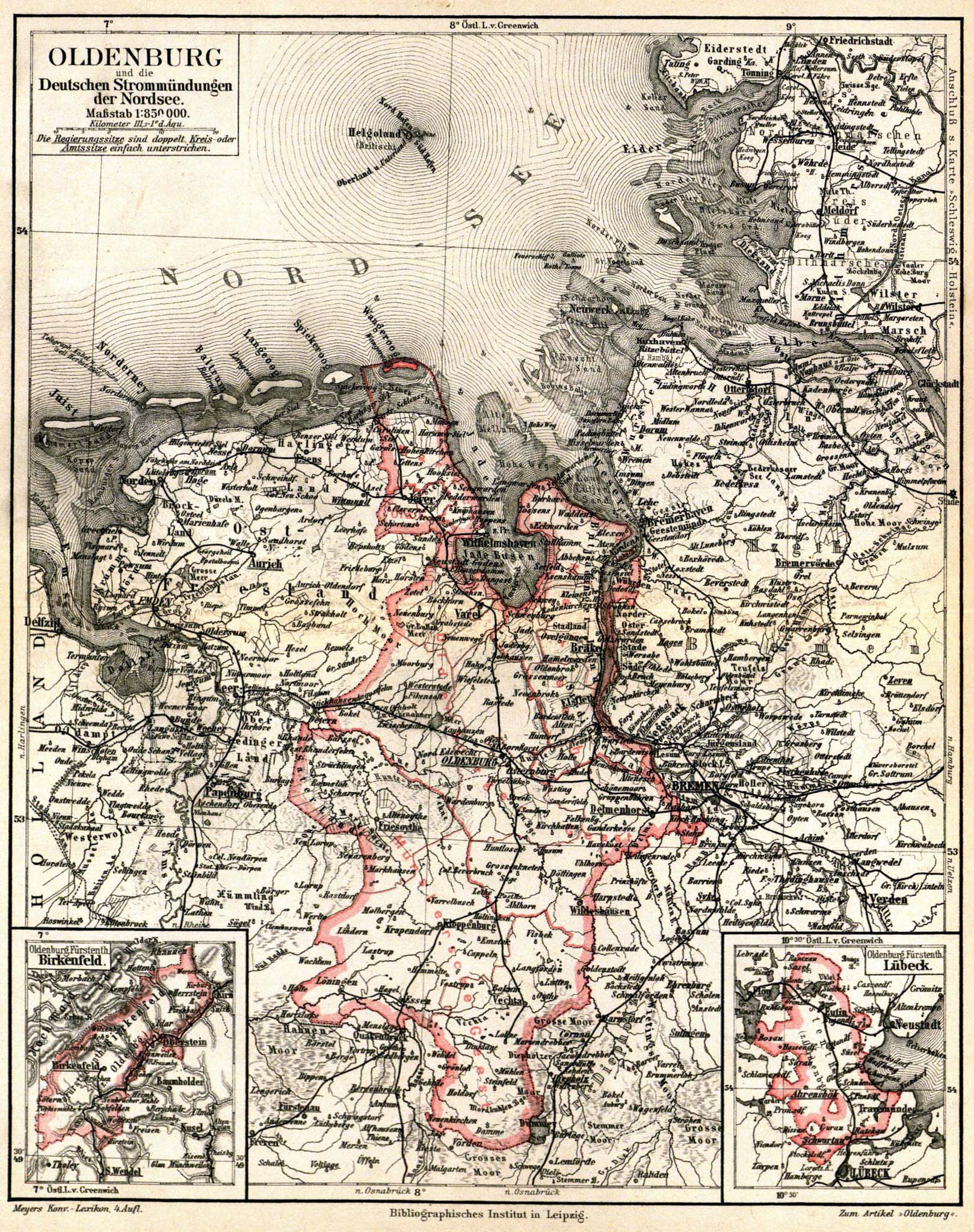 Karte „Oldenburg und die Deutschen Strommündungen der Nordsee“ (1 : 850 000), Nebenkarten: „Oldenburg. Fürstenth. Birkenfeld“ und „Oldenburg. Fürstenth. Lübeck“